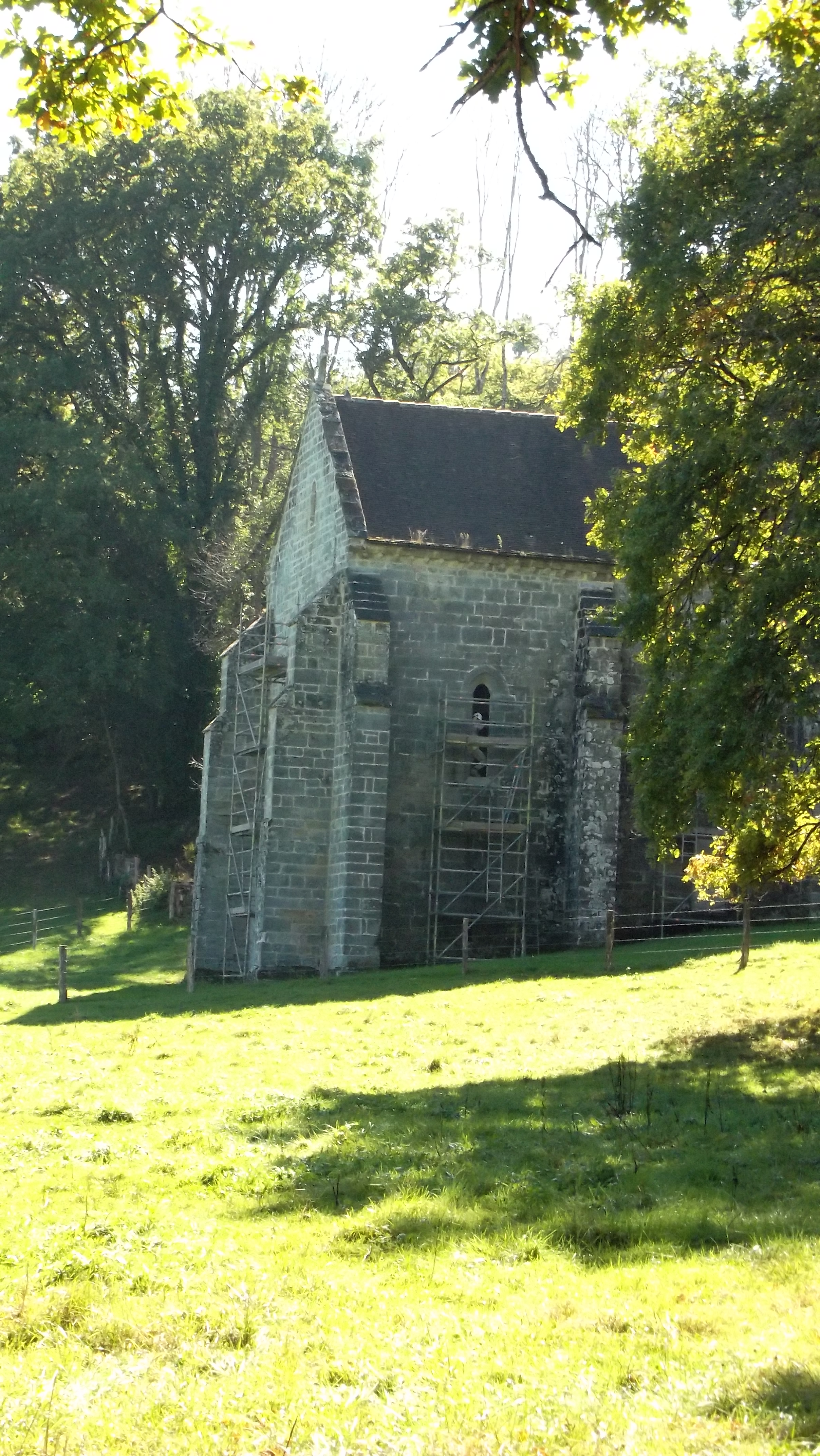 Chapelle Notre-Dame de Presles